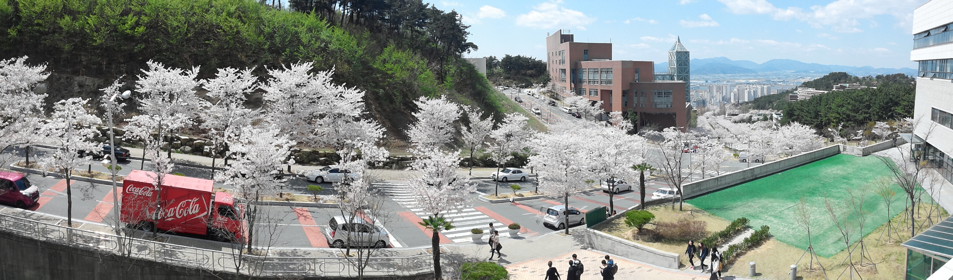 화랑관 앞 풍경